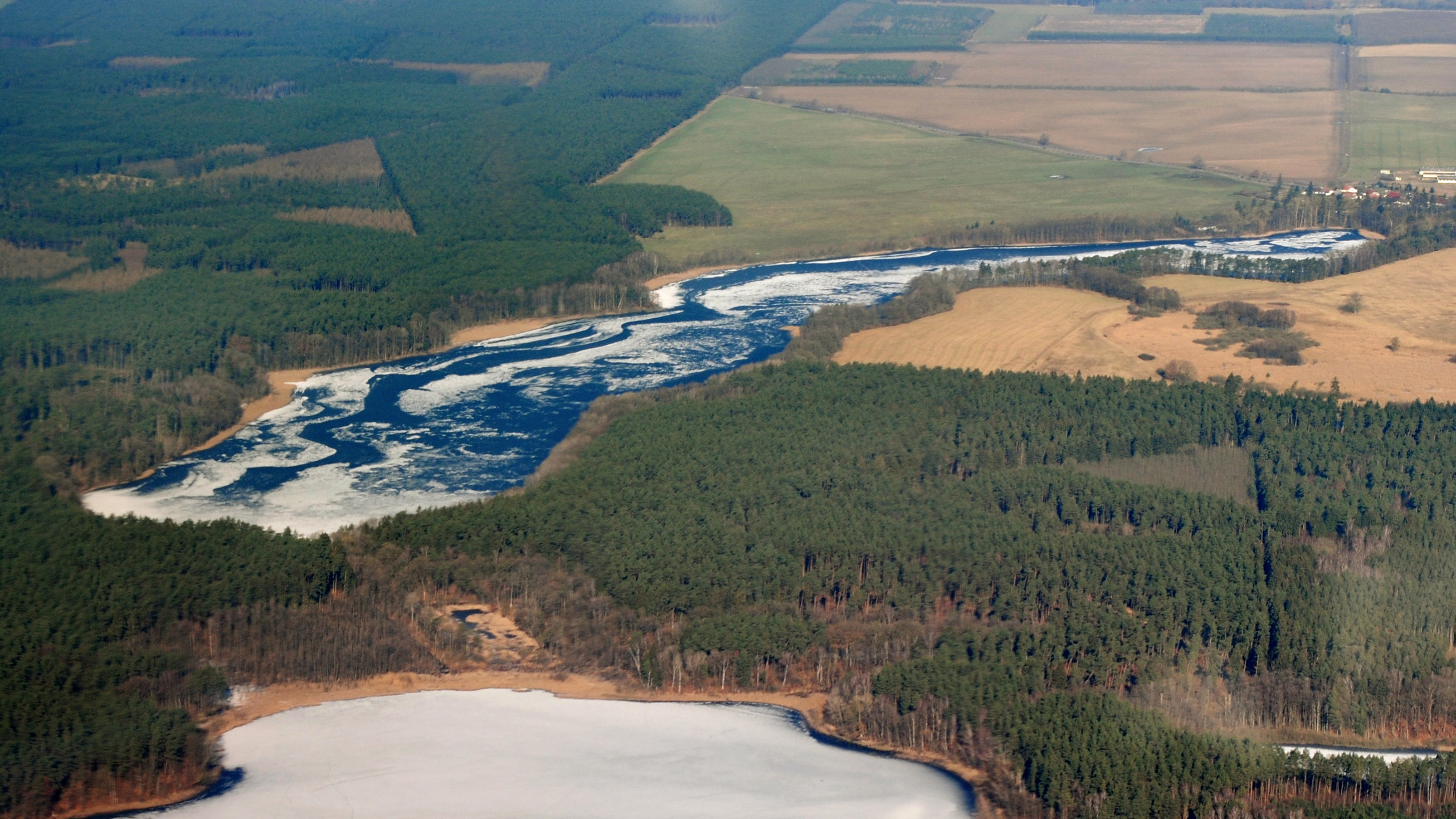 Bergsee (Neu Gaarz)